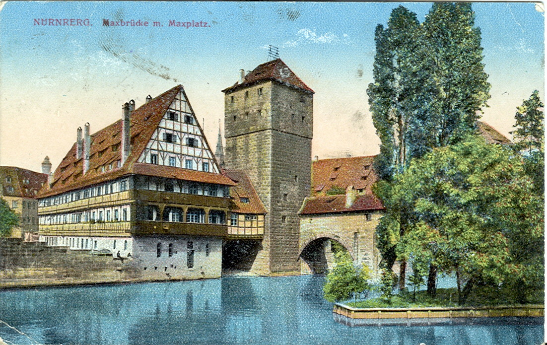 Postkarte, datiert 12.3.1918. Beschriftung: "Nürnberg - Maxbrücke mit Maxplatz".